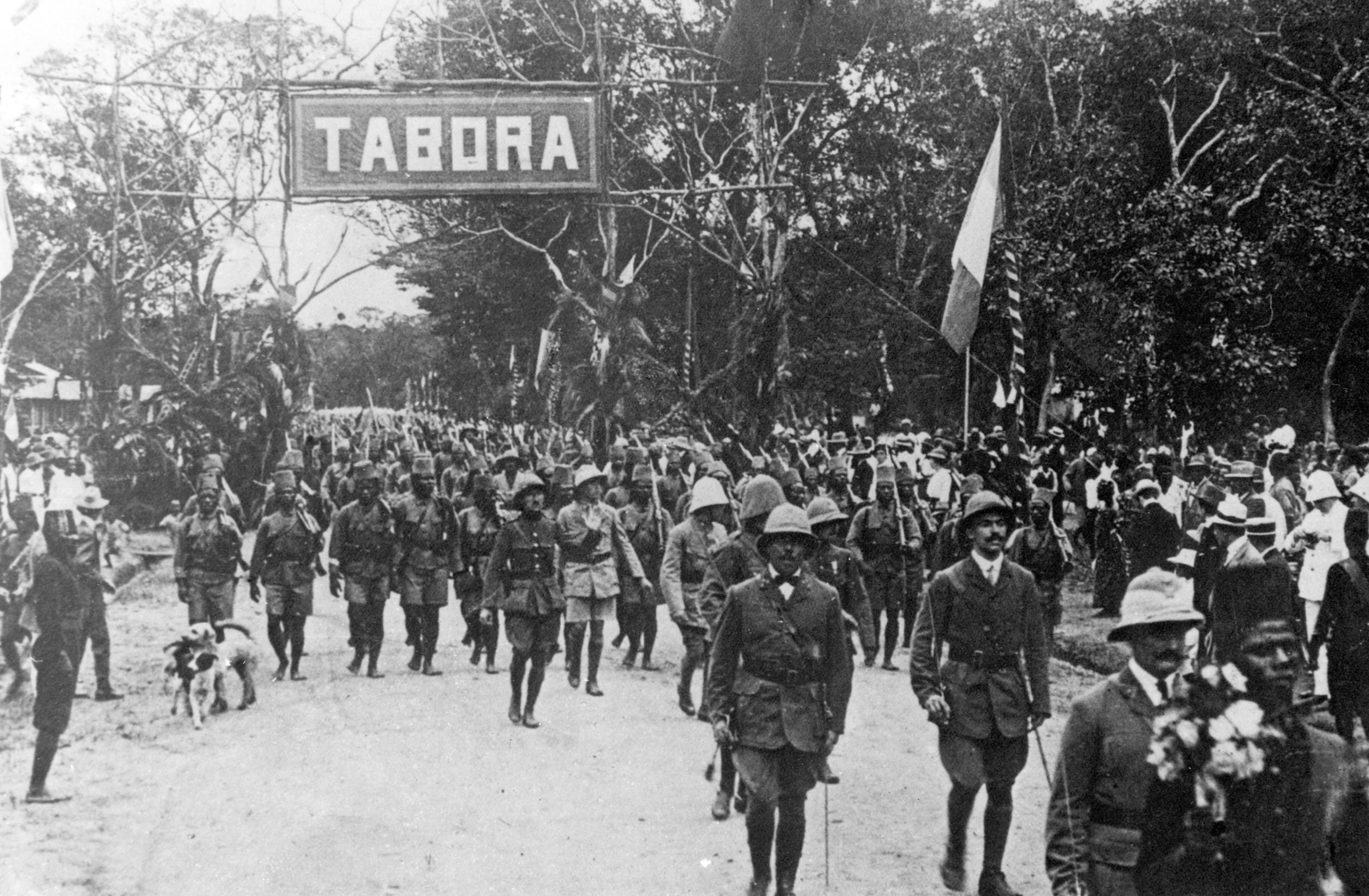 Force Publique trekt Tabora binnen